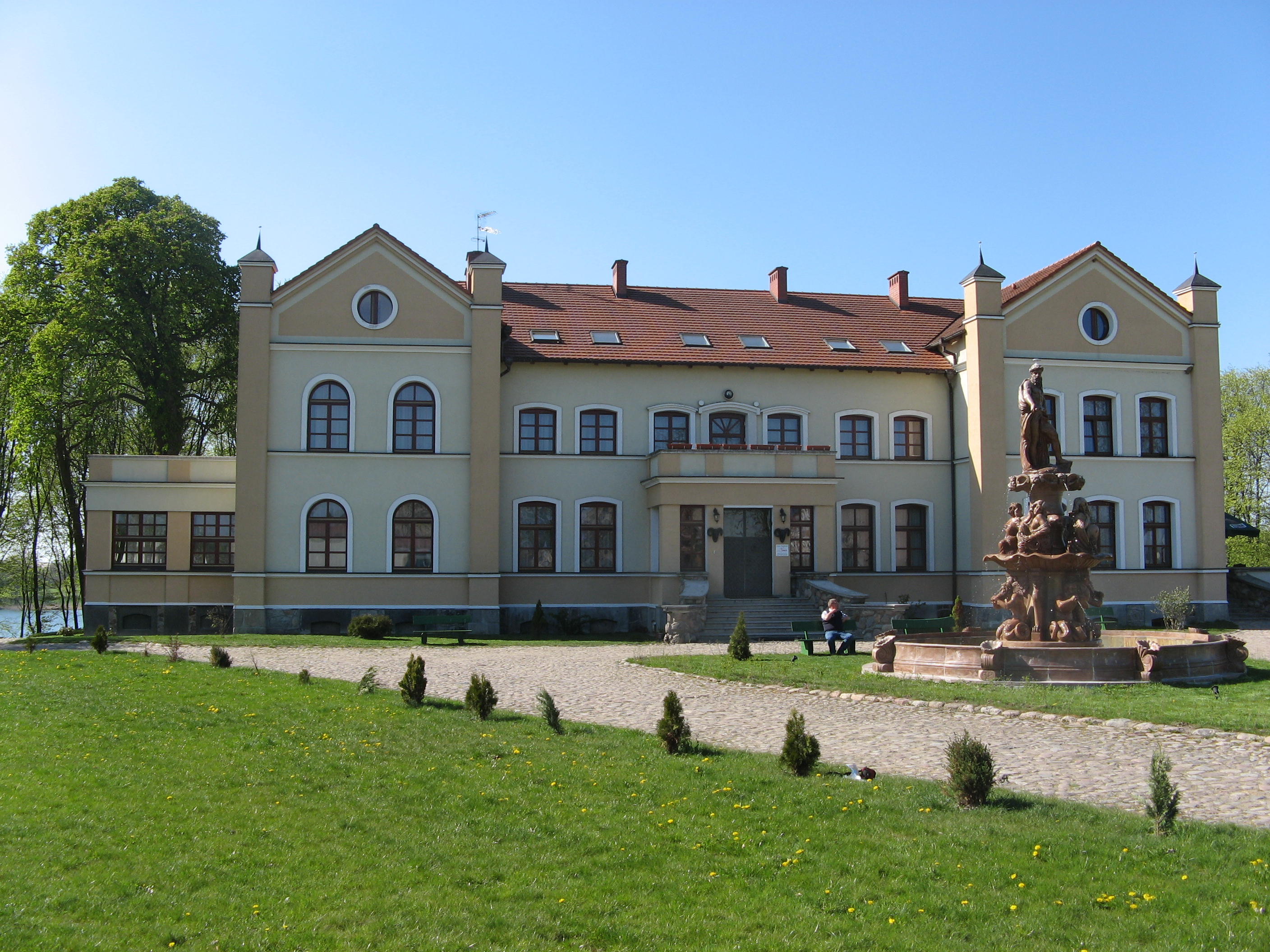 Pałac myśliwski "Anser" w Słonowicach odbudowany i przebudowany bez zachowania oryginalnego stylu architektonicznego.